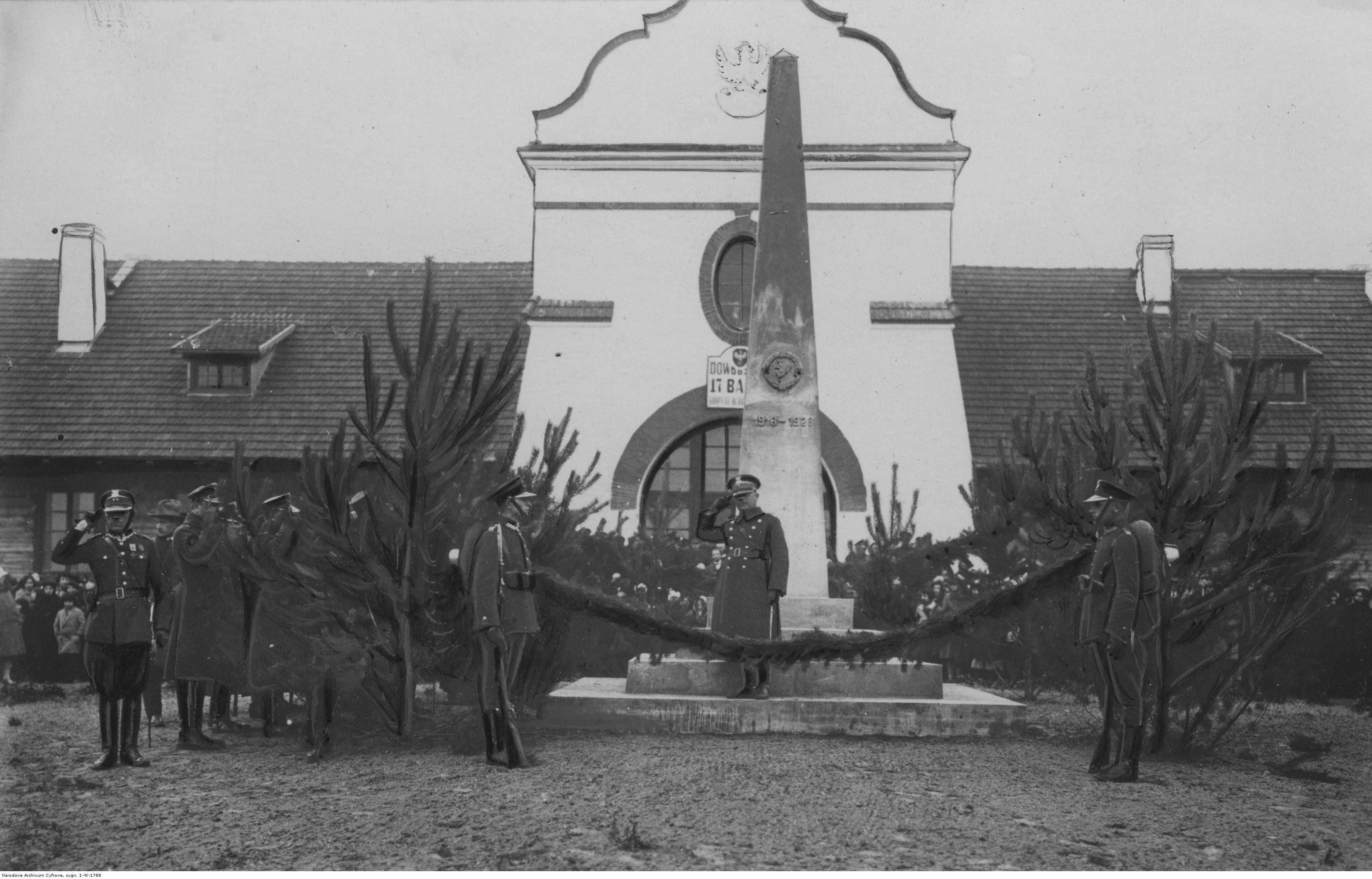 Uroczystości X-lecia istnienia Korpusu Ochrony Pogranicza w 17 Batalionie KOP "Dawidgródek". Uroczystości rocznicowe pod obeliskiem poświęconym Marszałkowi Józefowi Piłsudskiemu. Ilustrowany Kurier Codzienny - Archiwum Ilustracji.